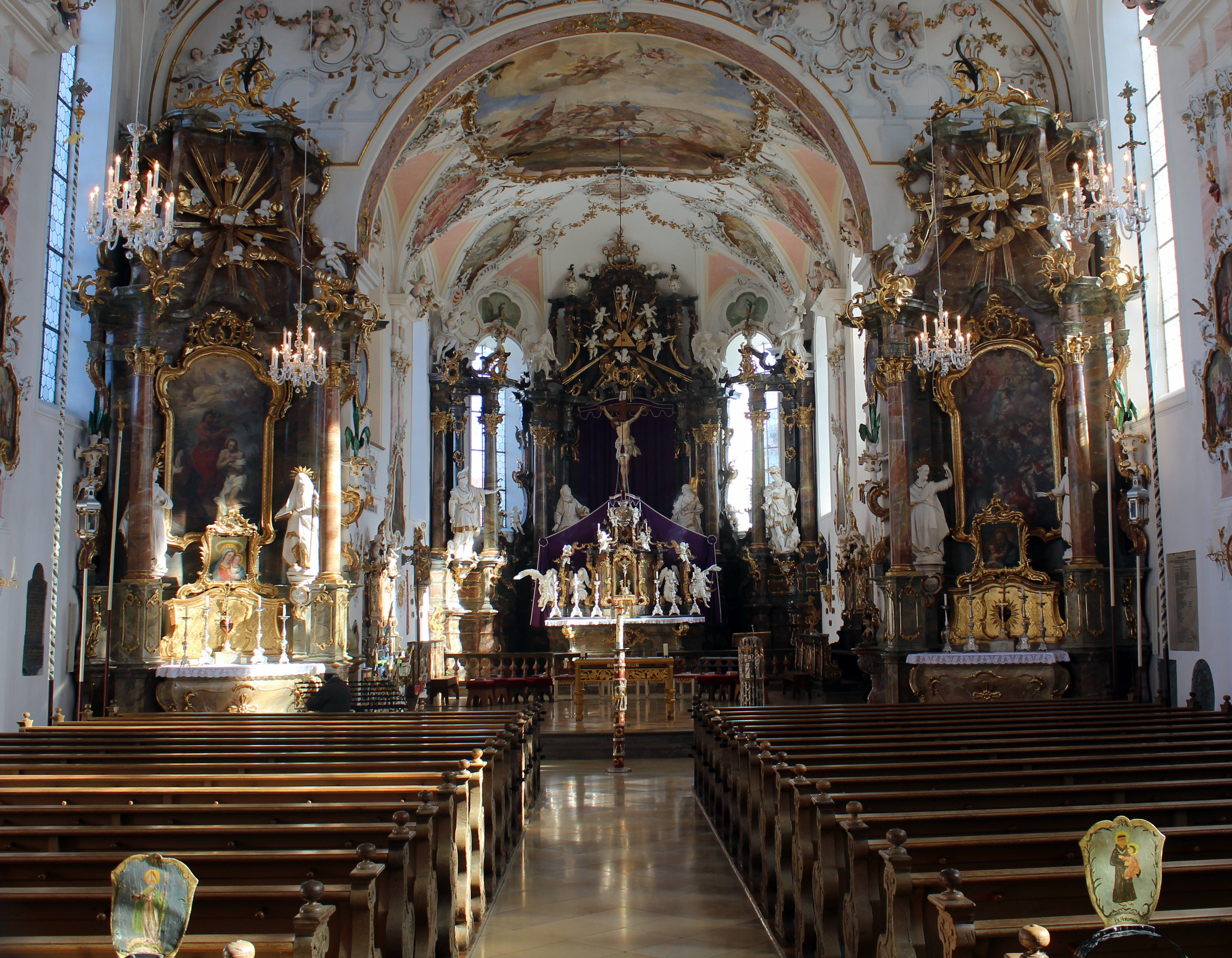 Seeg